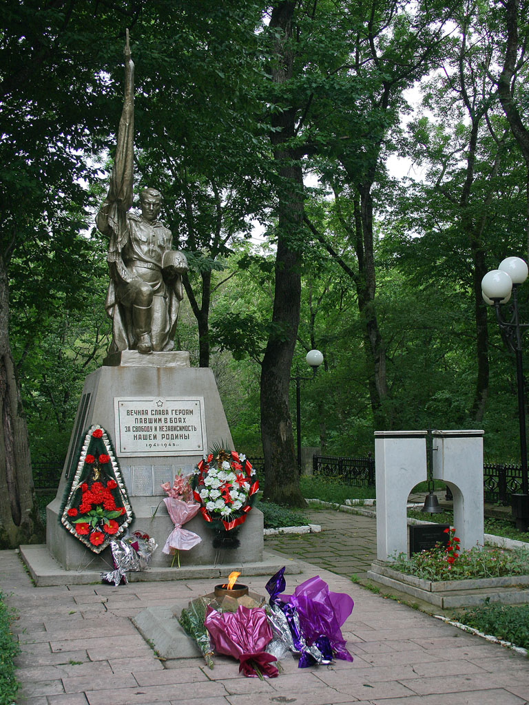 Железноводск. Вечный огонь